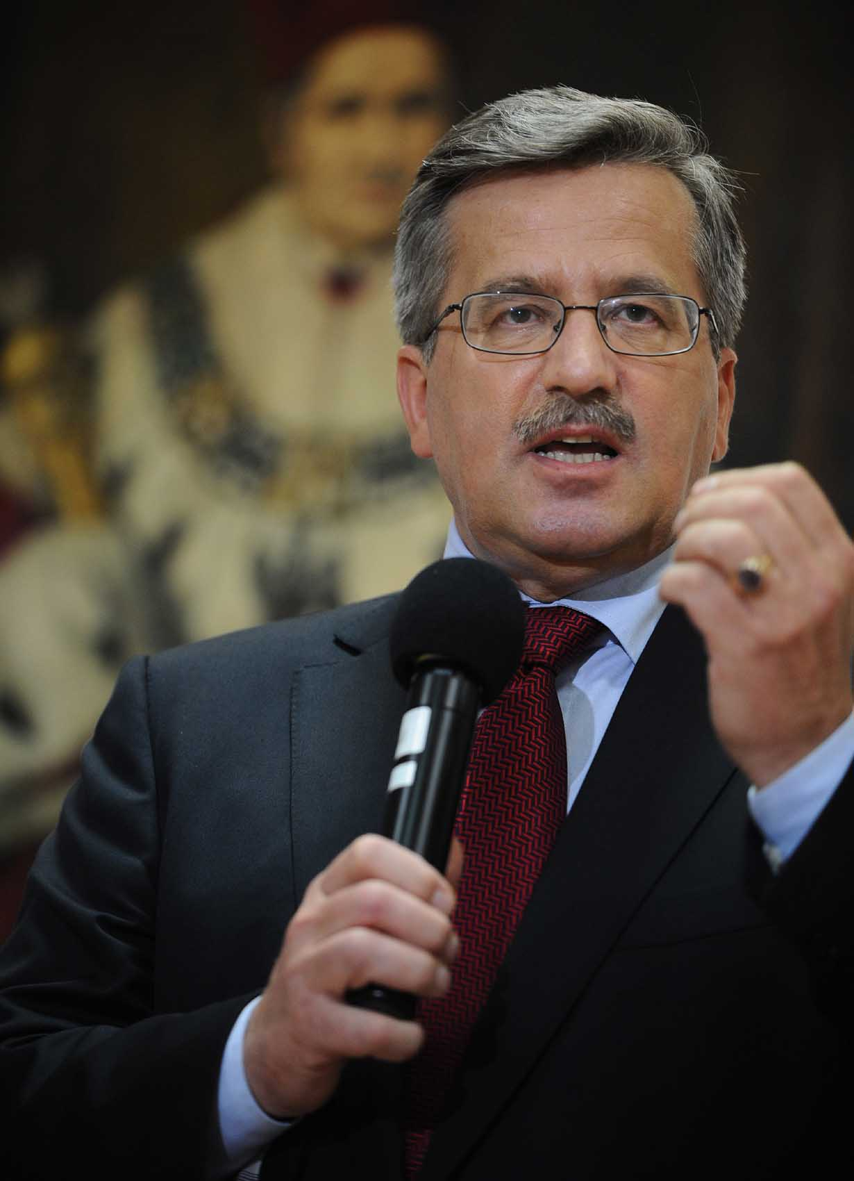 Bronisław Komorowski podczas kampanii prezydenckiej. 11.06.2010 - Warszawa - Uniwersytet Medyczny